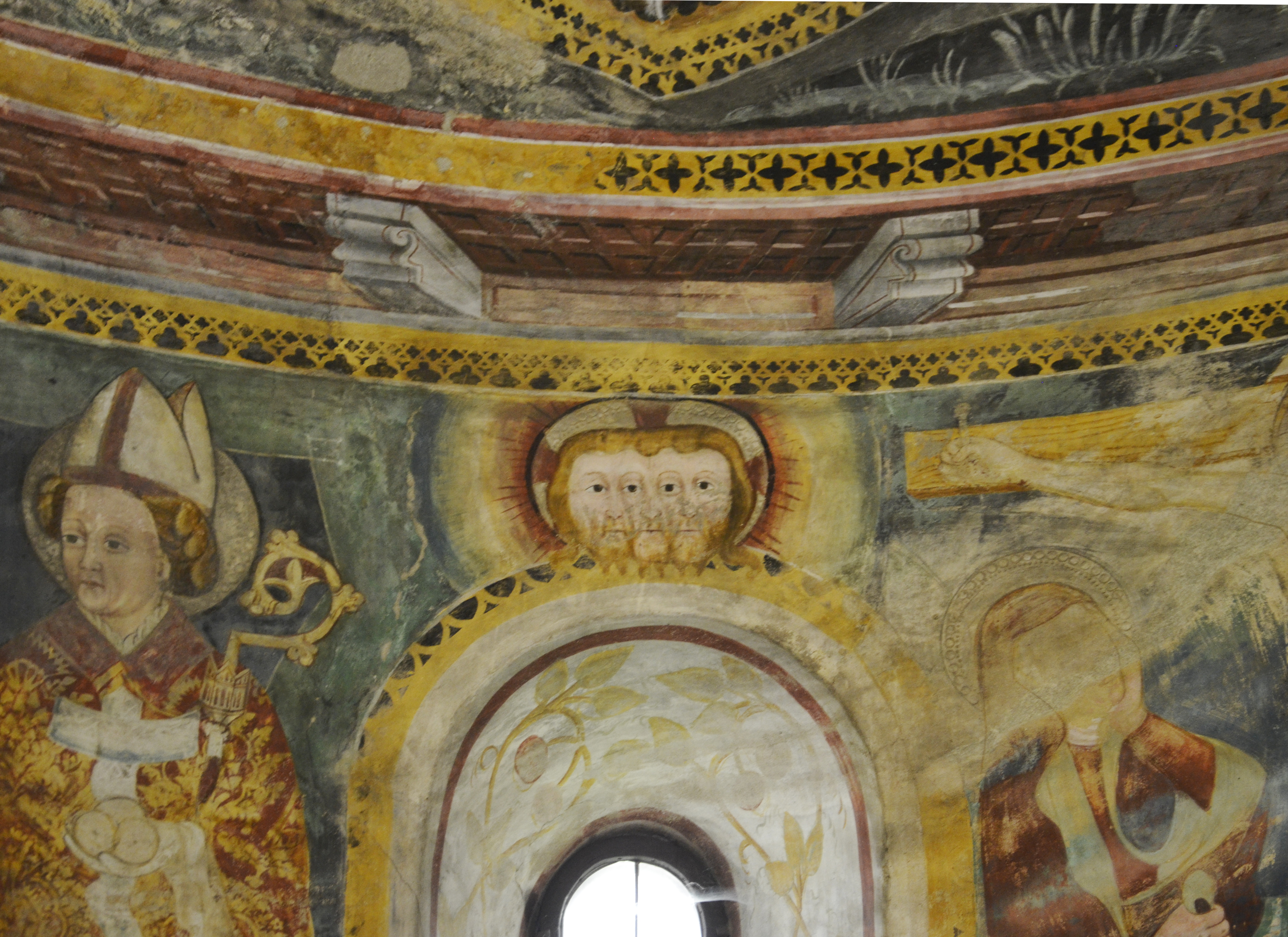 Chiesa di San Nicolao